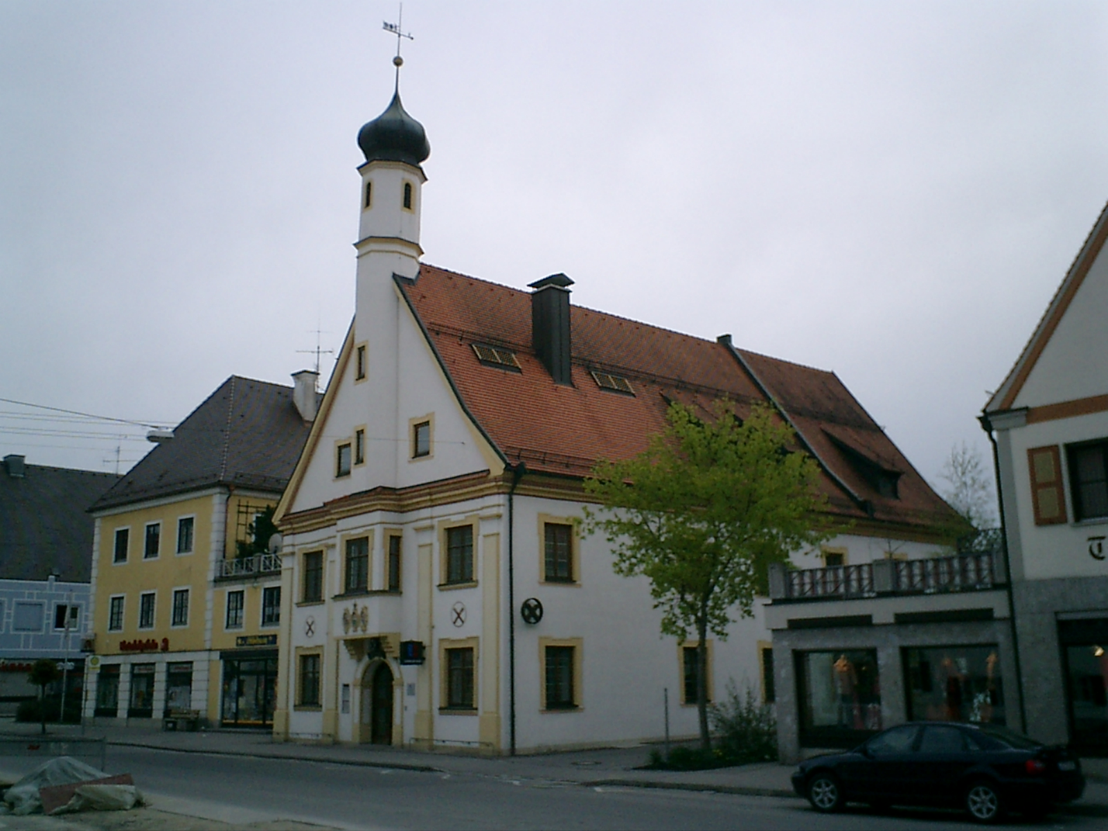 Altes Rathaus von Türkheim